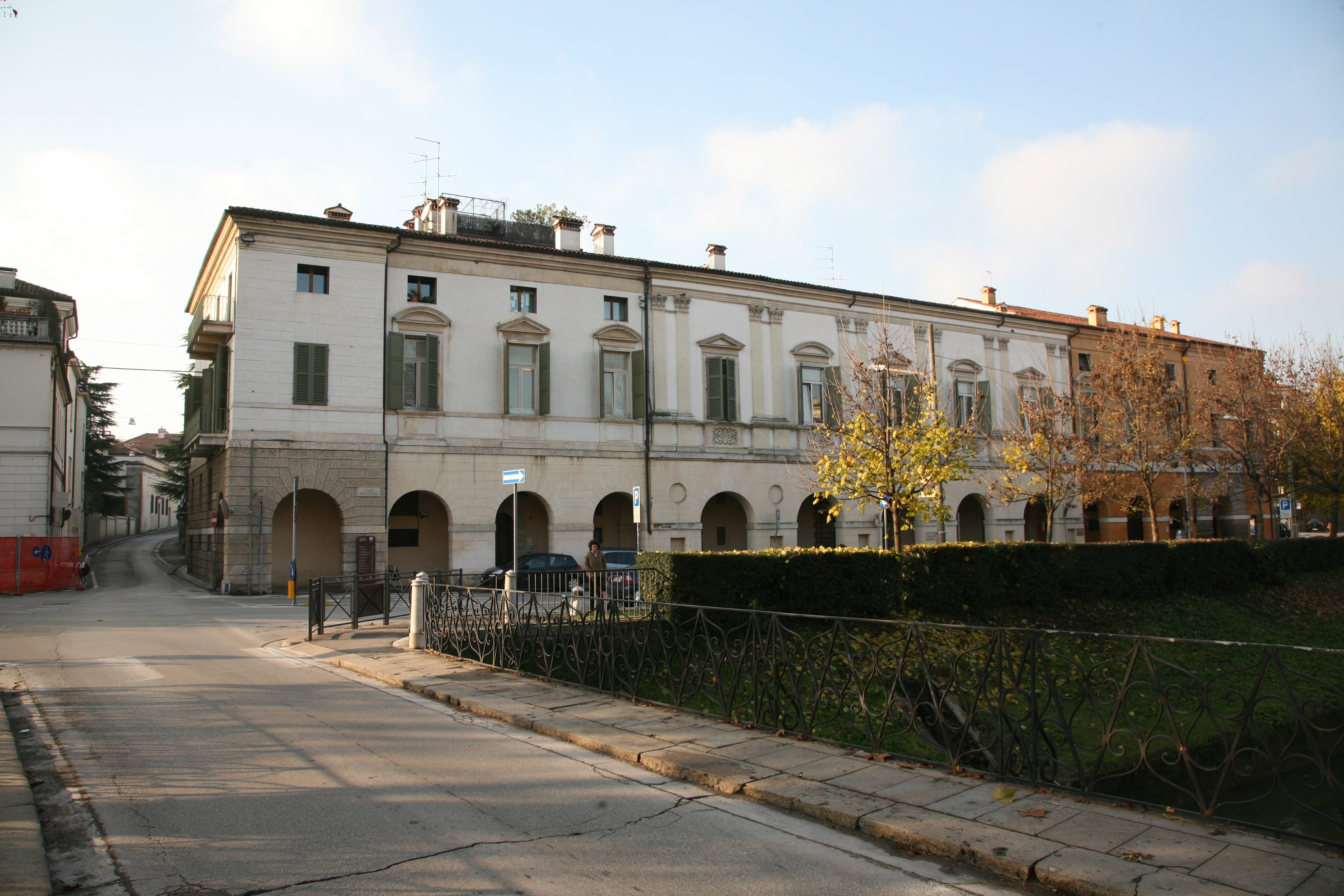 Palazzo Civena in Vicenza, designed by Andrea Palladio